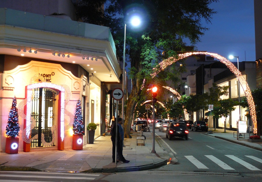 Rua Oscar Freire, São Paulo, Brasil.